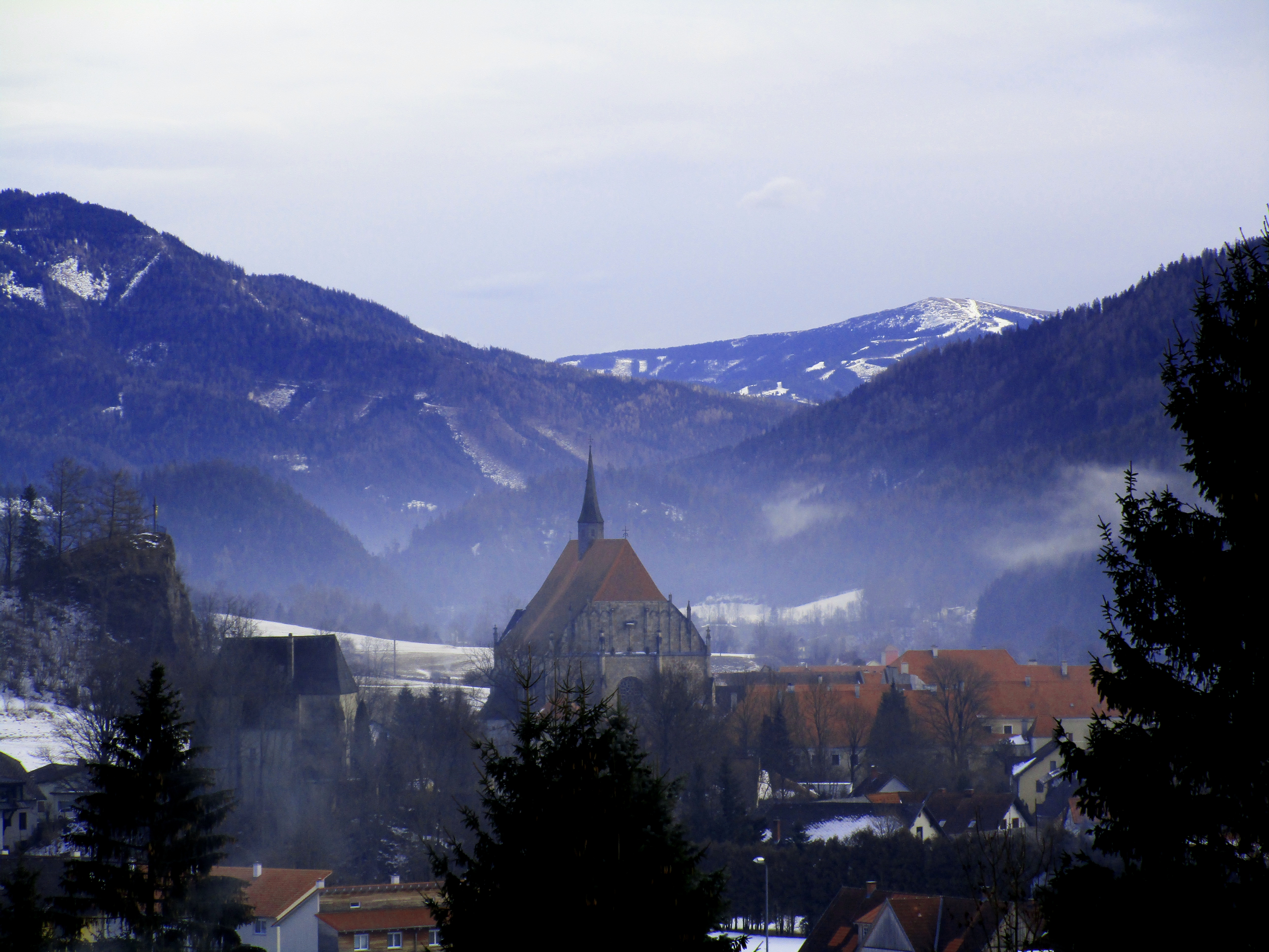 Neuberg an der Mürz im Jänner 2016